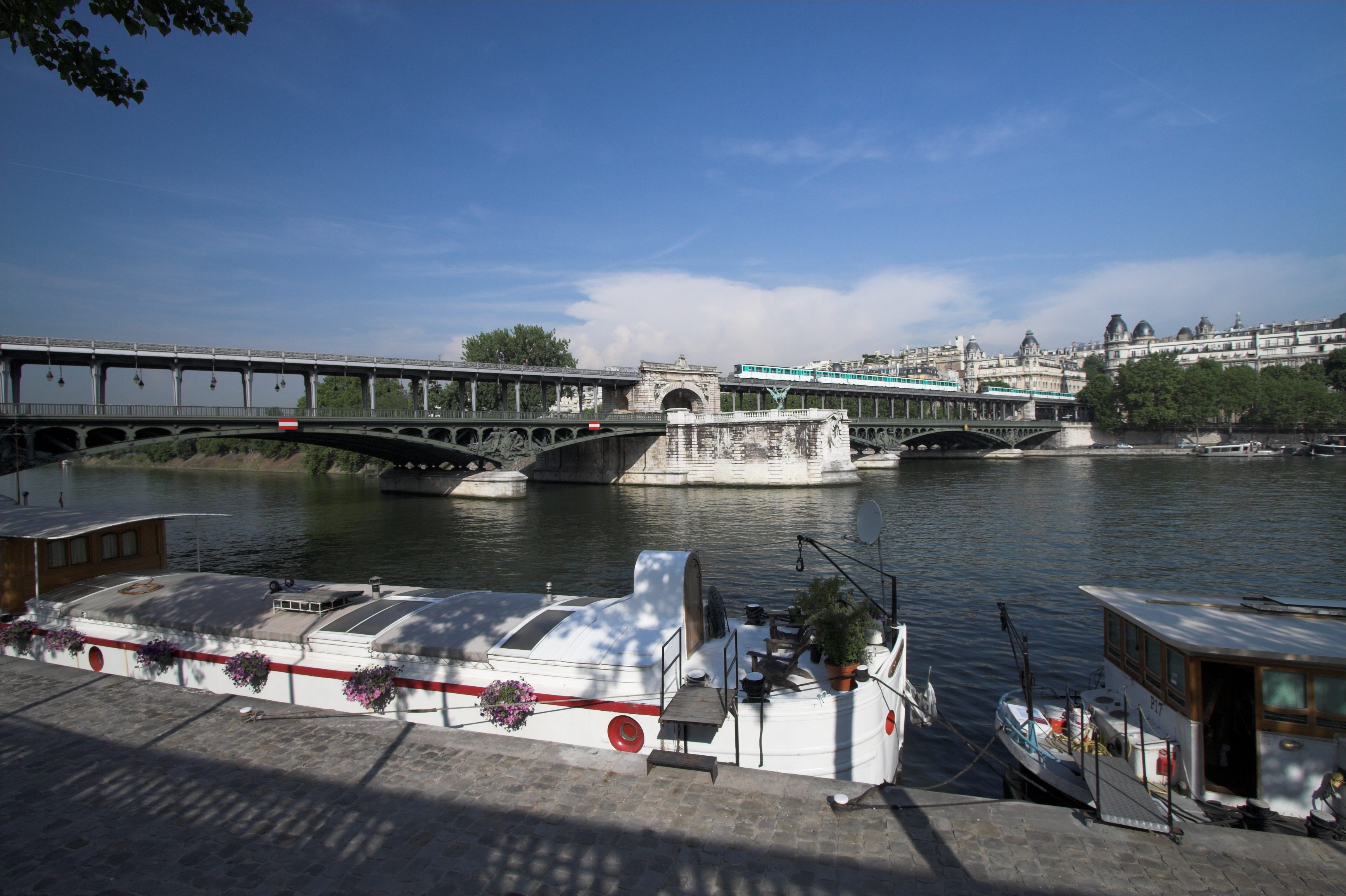 Pont de Bir-Hakeim(Paris, France)